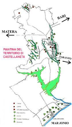 Pianta del territorio di Castellaneta